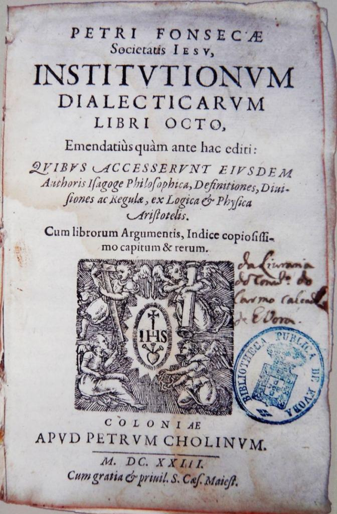 Institutionum Dialecticarum. Padre Pedro da Fonseca (1528; 1599), Colónia, 1623. Coloniae: Apud Petrum Cholinum, 1623. Biblioteca Pública e Arquivo Distrital de Évora, Portugal. Pub, por Maria Luísa Guerra, Mestre e Discípulos Notáveis da Universidade de Évora (Séc. XVI a Séc. XVIII), 2005, Évora, p. 119.